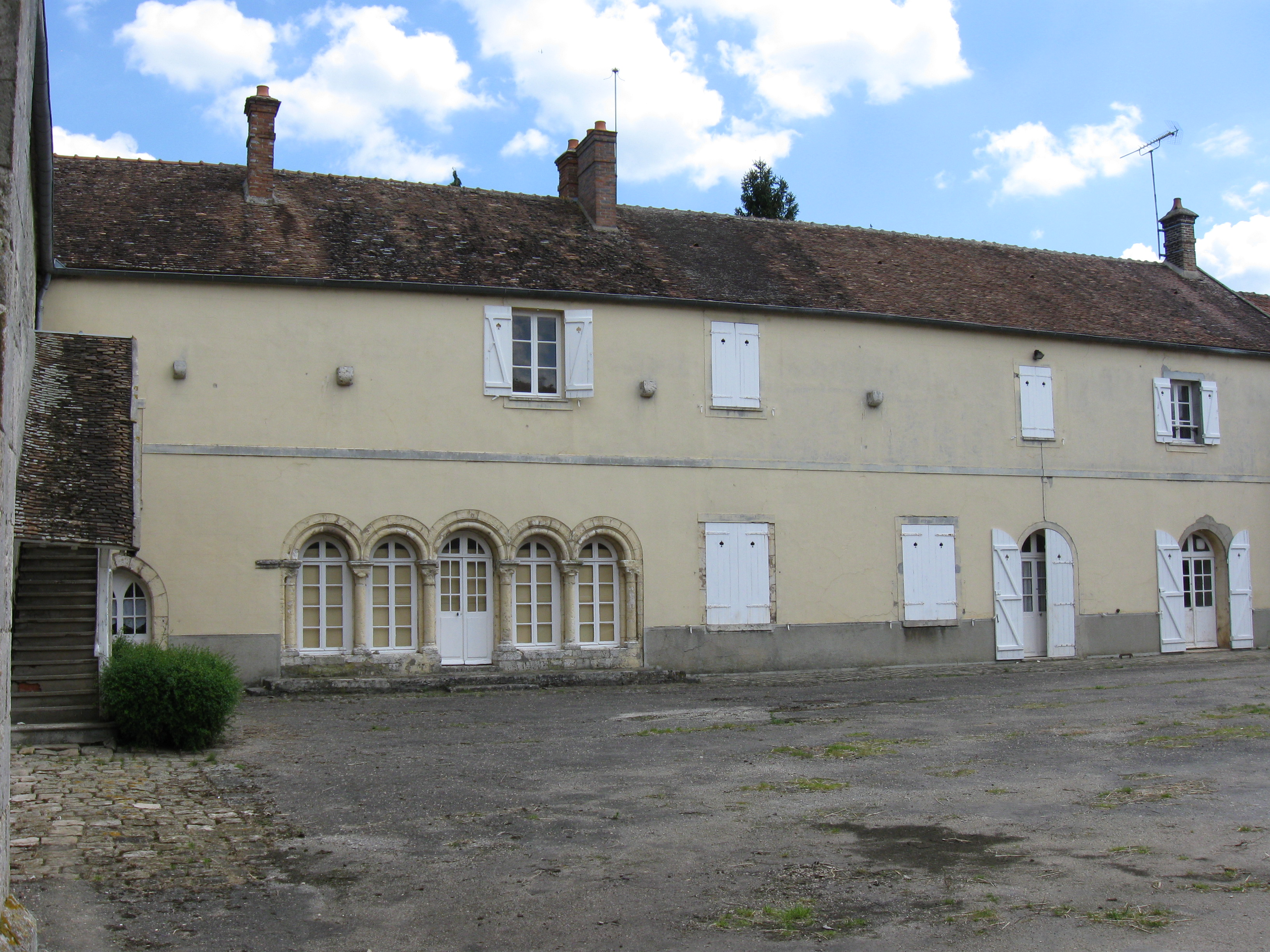 Ferme de Saint-Étienne de Trin, ancien prieuré Grandmontains. Bâtiments à gauche de la cour. (département de la Seine-et-Marne, région Île-de-France).